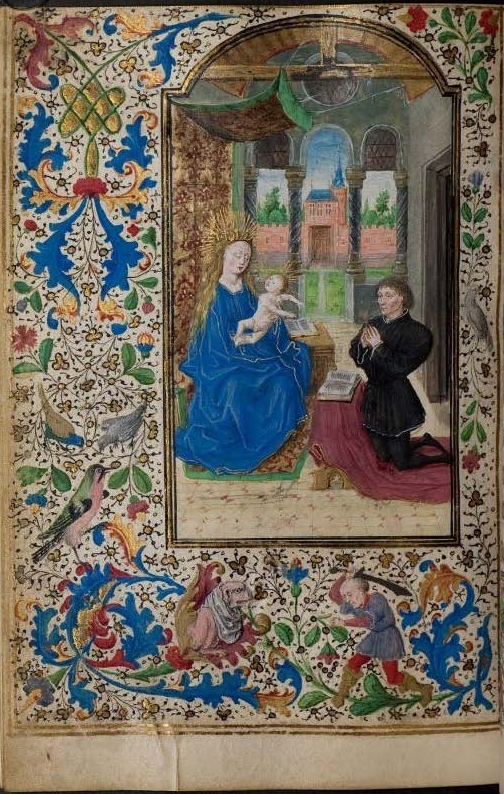 Sachsenheim-Gebetbuch, fol. 126v., Miniatur: Vor Maria mit dem Kind kniet ein Herr von Sachsenheim.